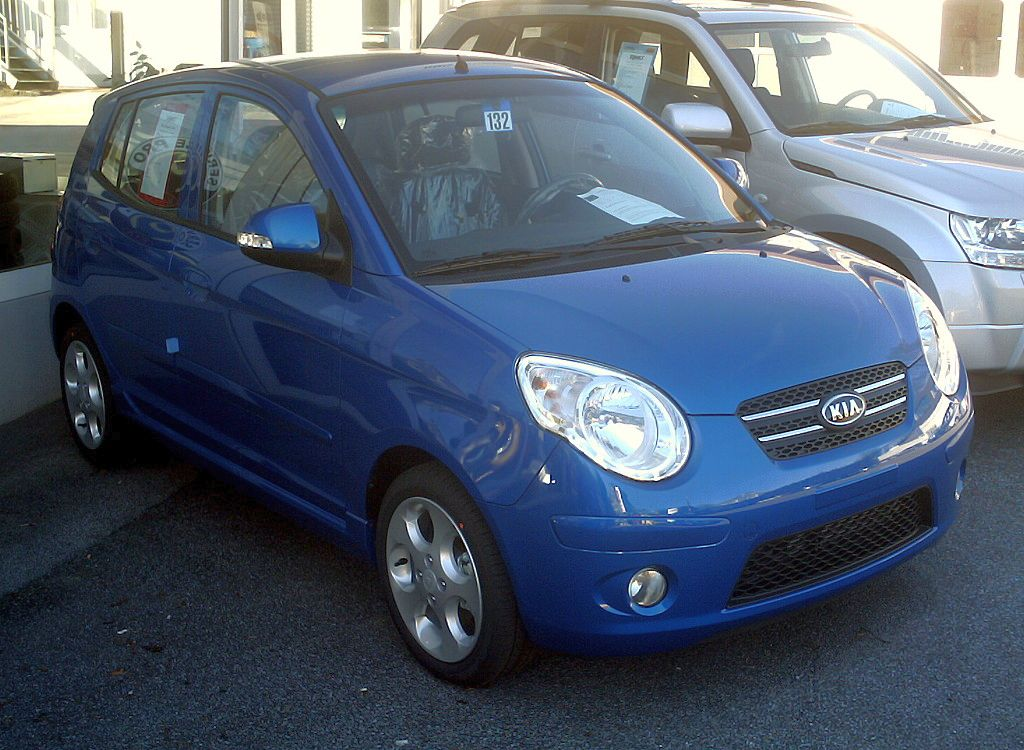 Kia Picanto